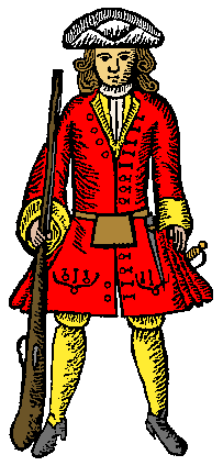 Uniforme del Regiment de la Ciutat de Barcelona. Figura basada en els dibuixos del manual d'instrucció del coronel Ferrer (1714)